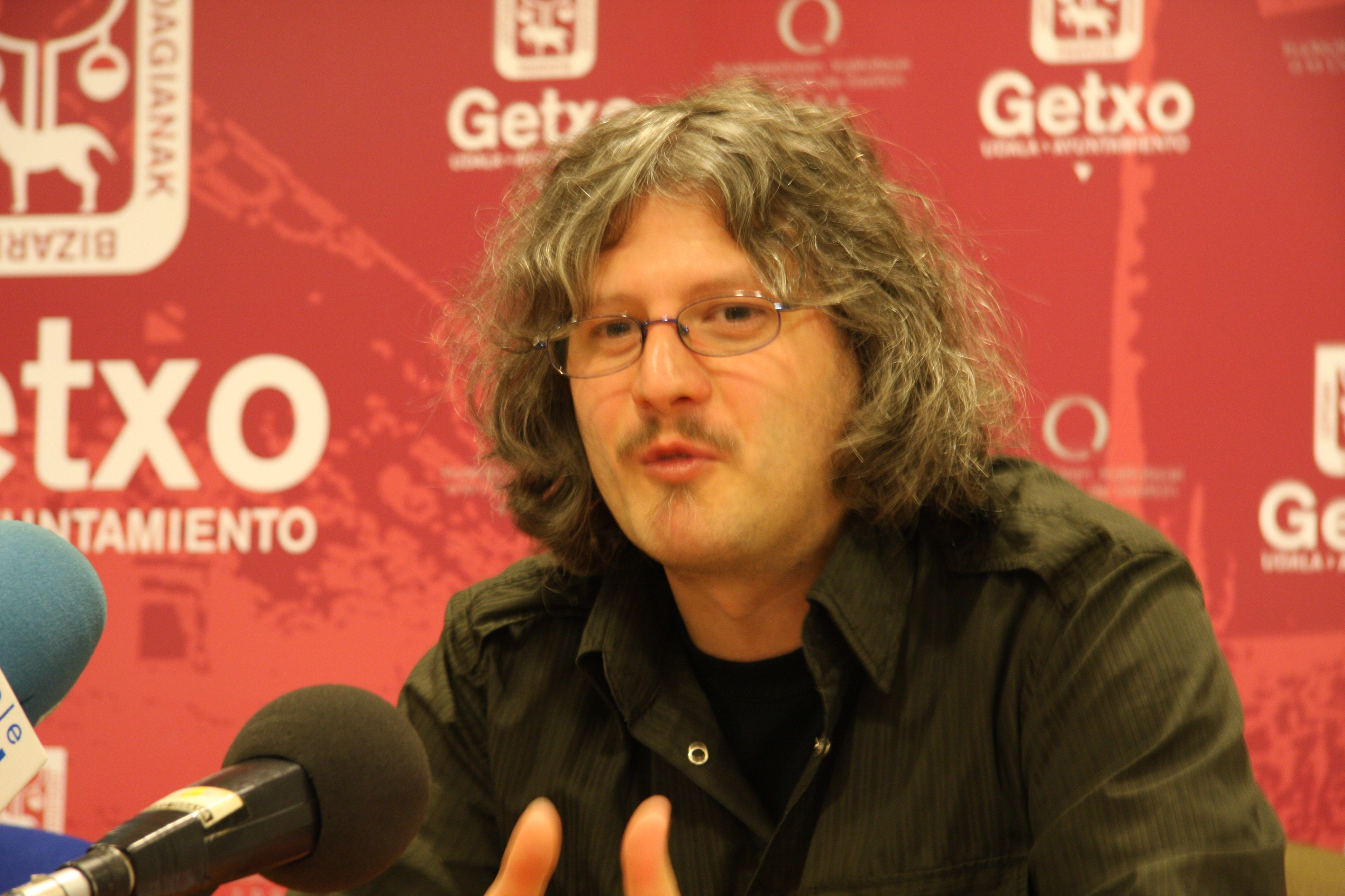 Mikel Markez abeslaria, 2008ko maiatzaren 14an Algortako kultura etxean emandako prentsaurrekoan